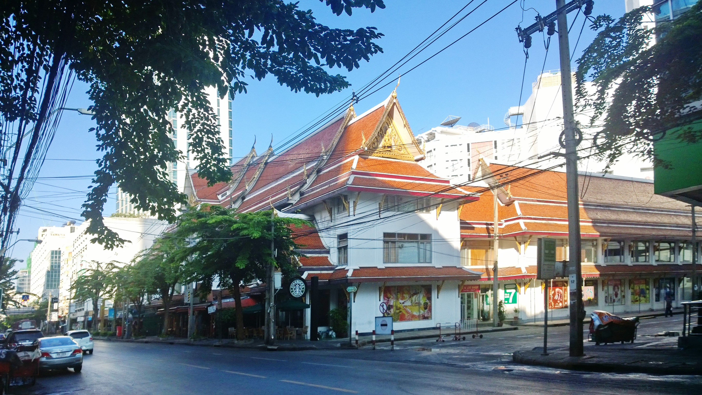 Si Phraya, Bang Rak, Bangkok 10500, Thailand